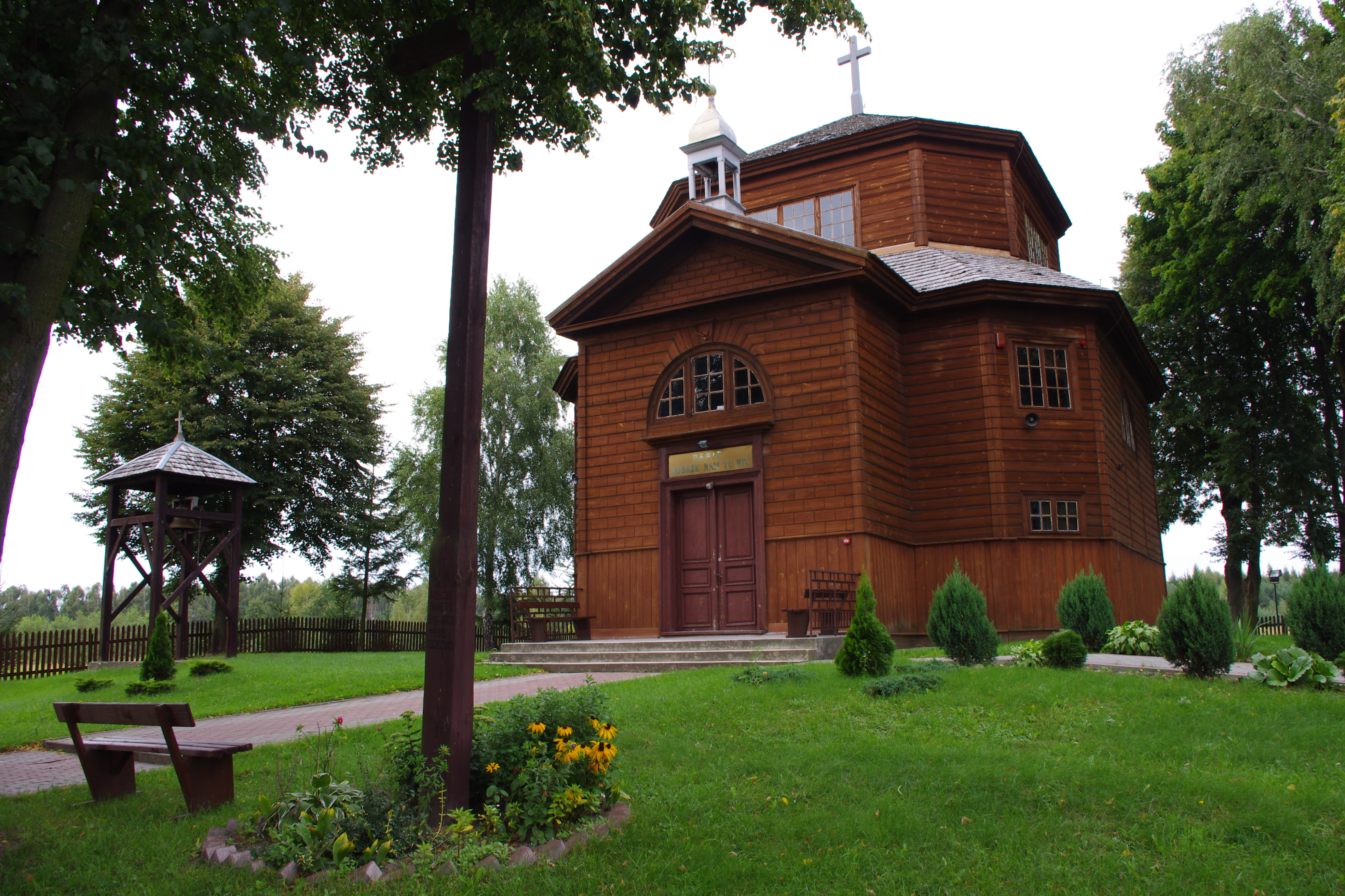 Drewniany wsparty na doryckich kolumnach z modrzewiowego pnia kościółek pw.Przemienienia Pańskiego/1899r./w Borowicy 10 od Krasnegostawu.